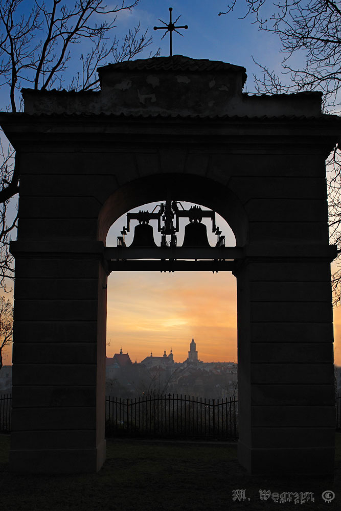 Lublin, dzwonnica przy kościele św. Mikołaja na Czwartku - zachód słońca - Małgorzata Węgrzyn (WildGoha)